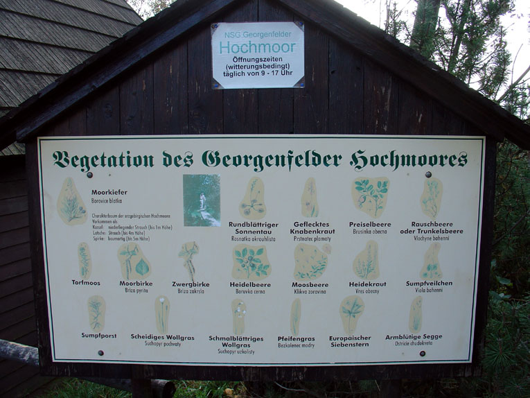 Zinnwald-Georgenfeld, Osterzgebirge, Hinweisschild "Vegetation des Georgenfelder Hochmoores"